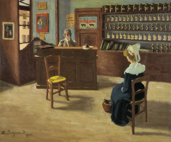 La consultation par le peintre suisse Marius Borgeaud, 1911, huile sur toile, collection privée, no 17 du catalogue raisonné du peintre.